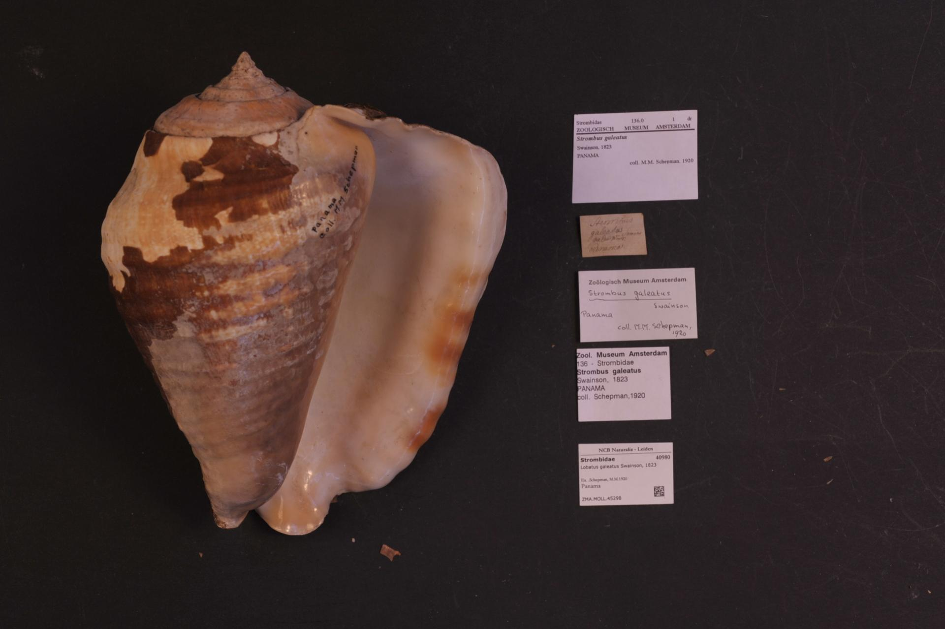 Lobatus galeatus Swainson, 1823